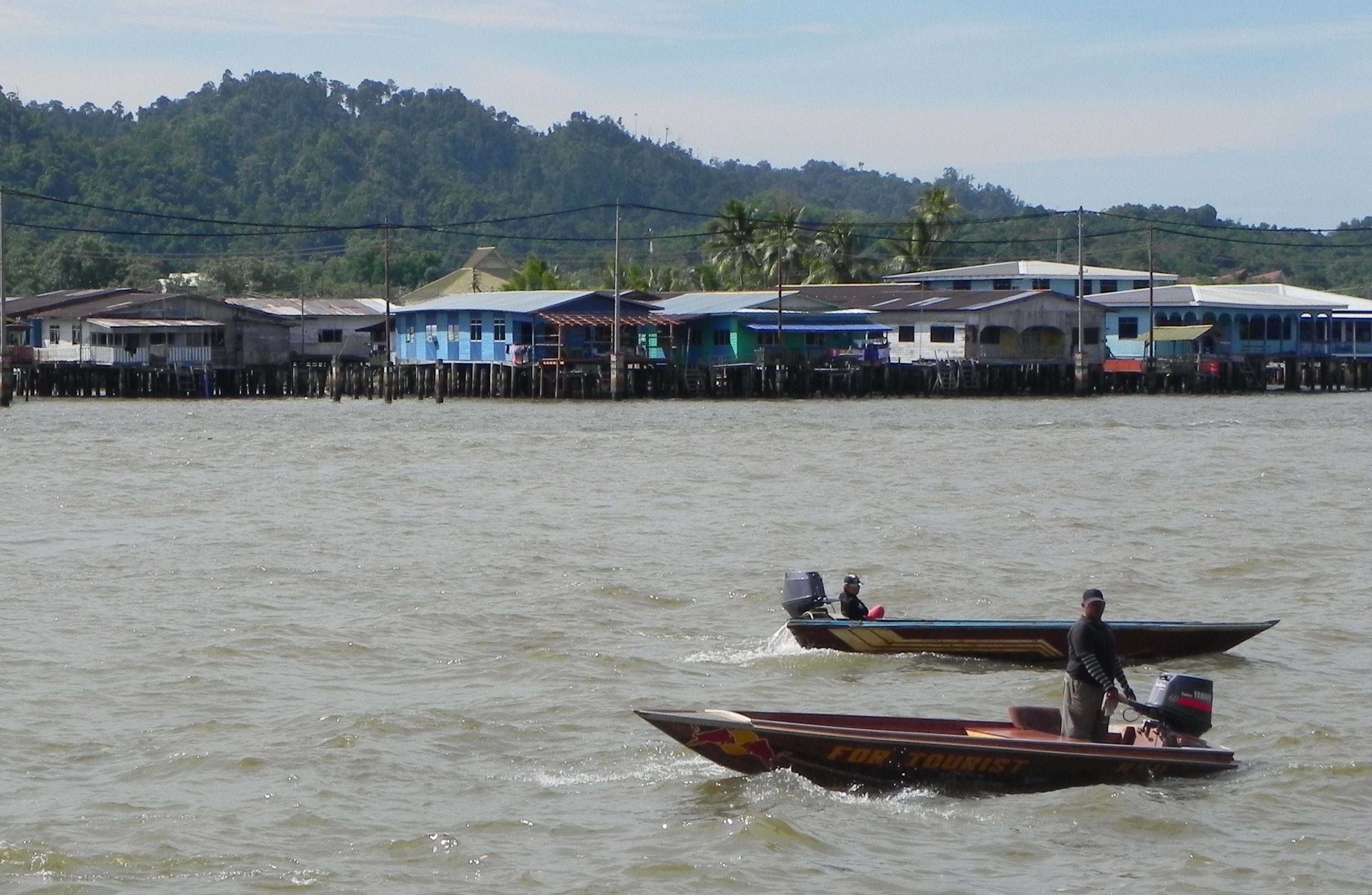 Wassertaxen vor dem Wasserdorf Kampong Ayer am Brunei-Fluss